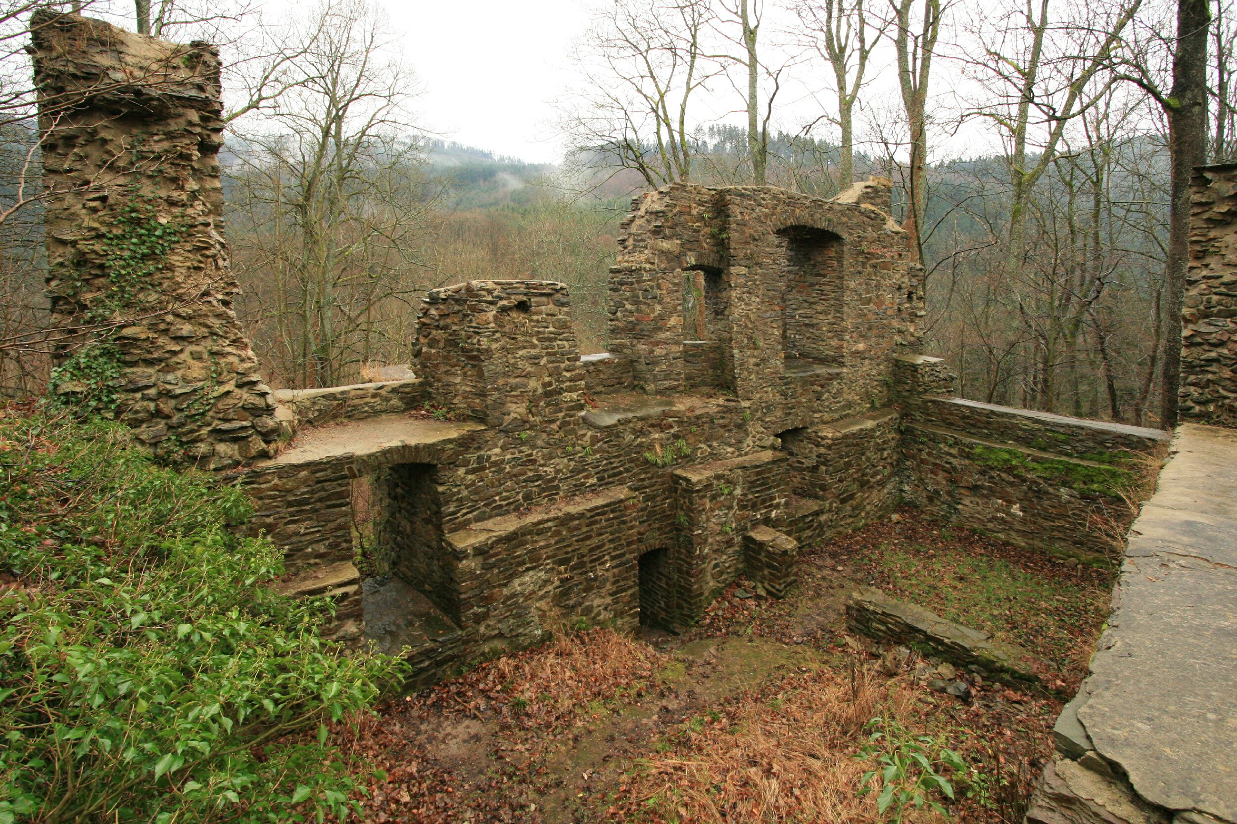 Burg Schwarzenberg Blick nach S, Drostenhaus